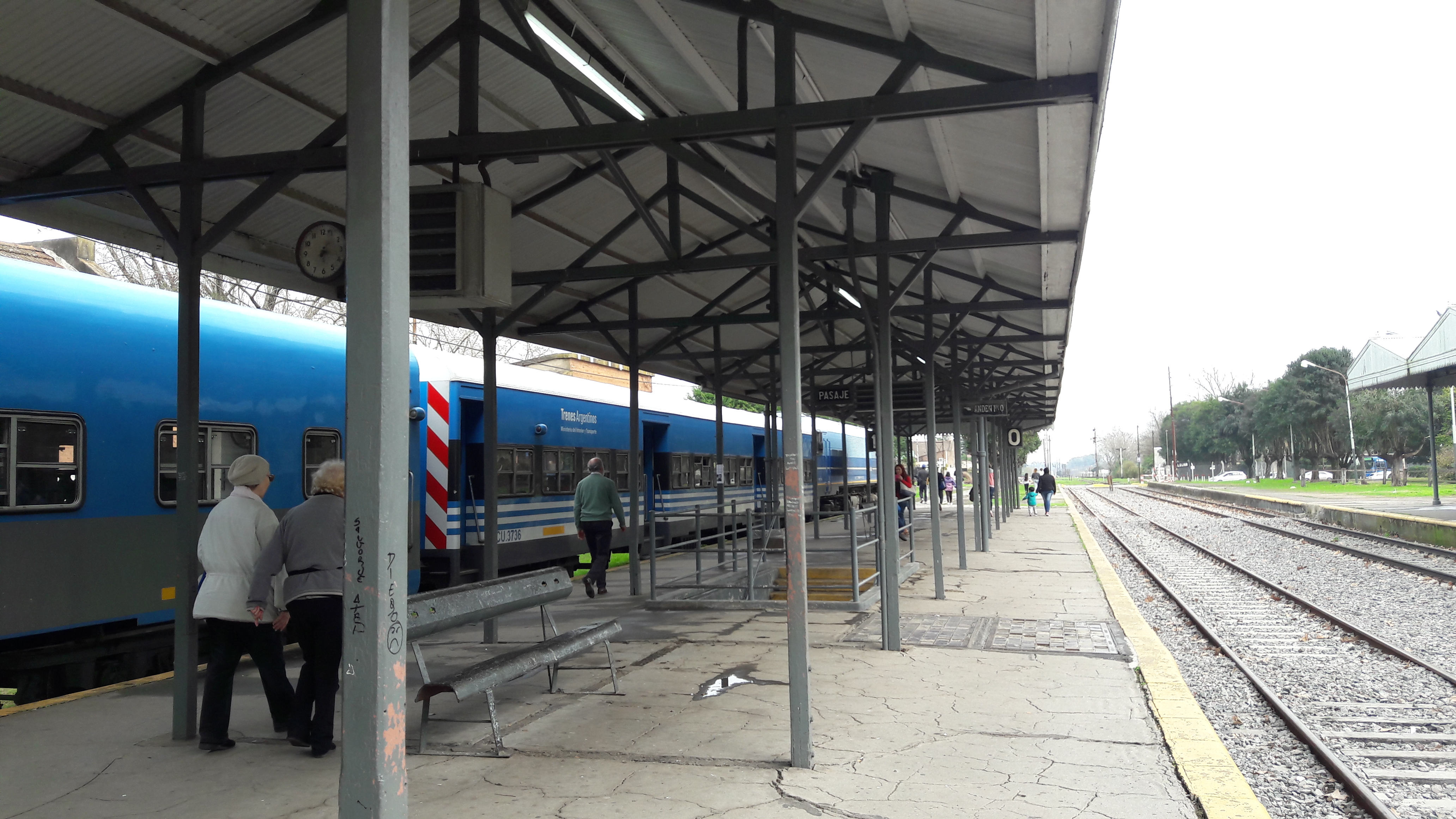 Estación Luján del Ferrocarril Sarmiento.